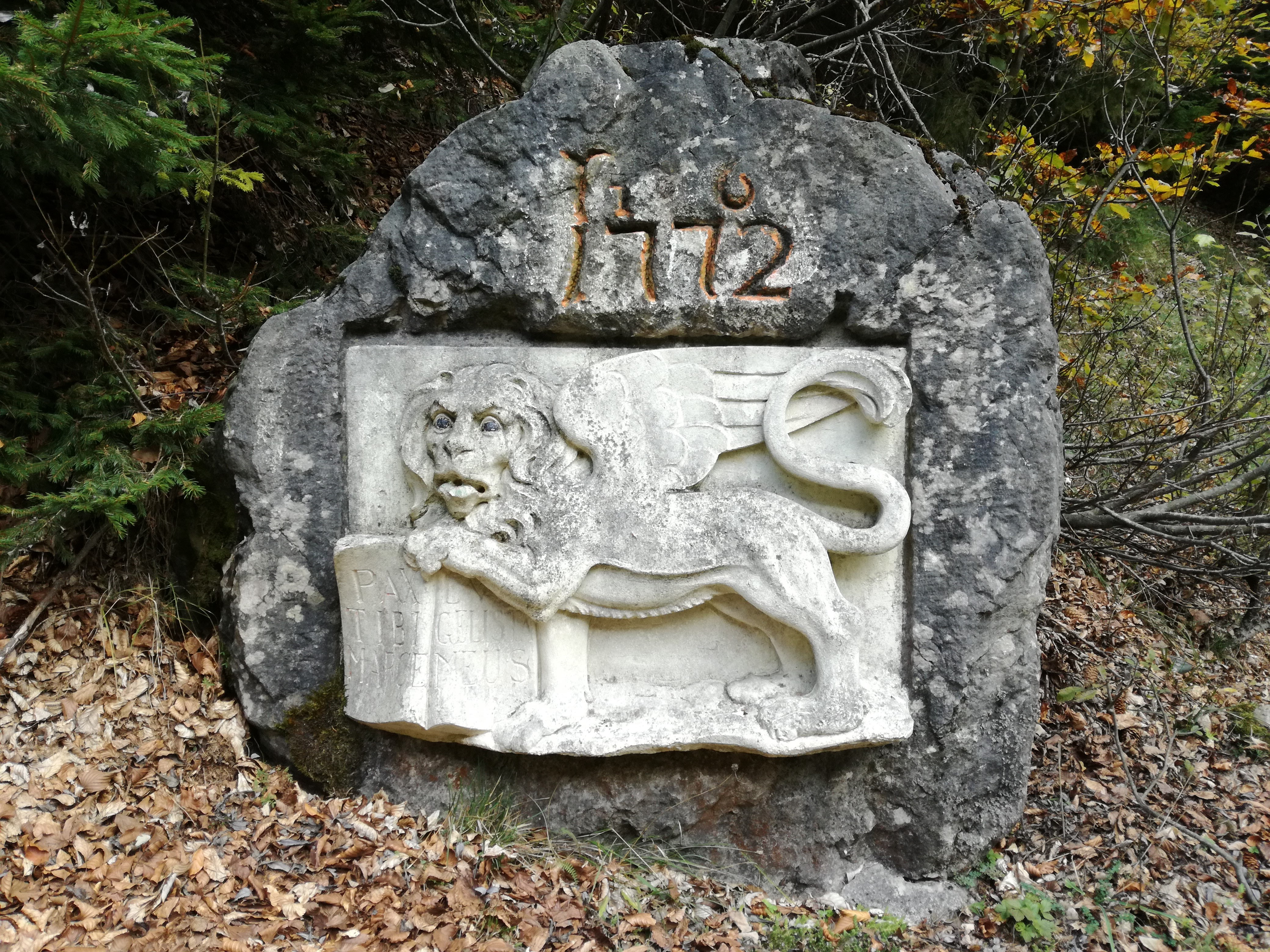 Passo della Borcola - Alter Grenzstein der Republik Venedig